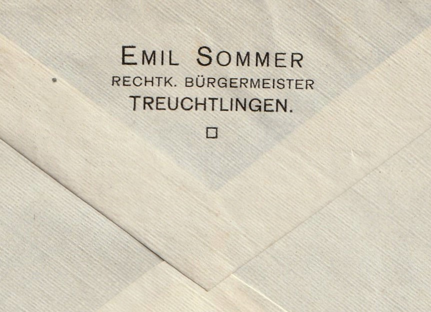 Ausschnitt Briefkuvert Bürgermeister Emil Sommer Treuchtlingen (1885-1936)